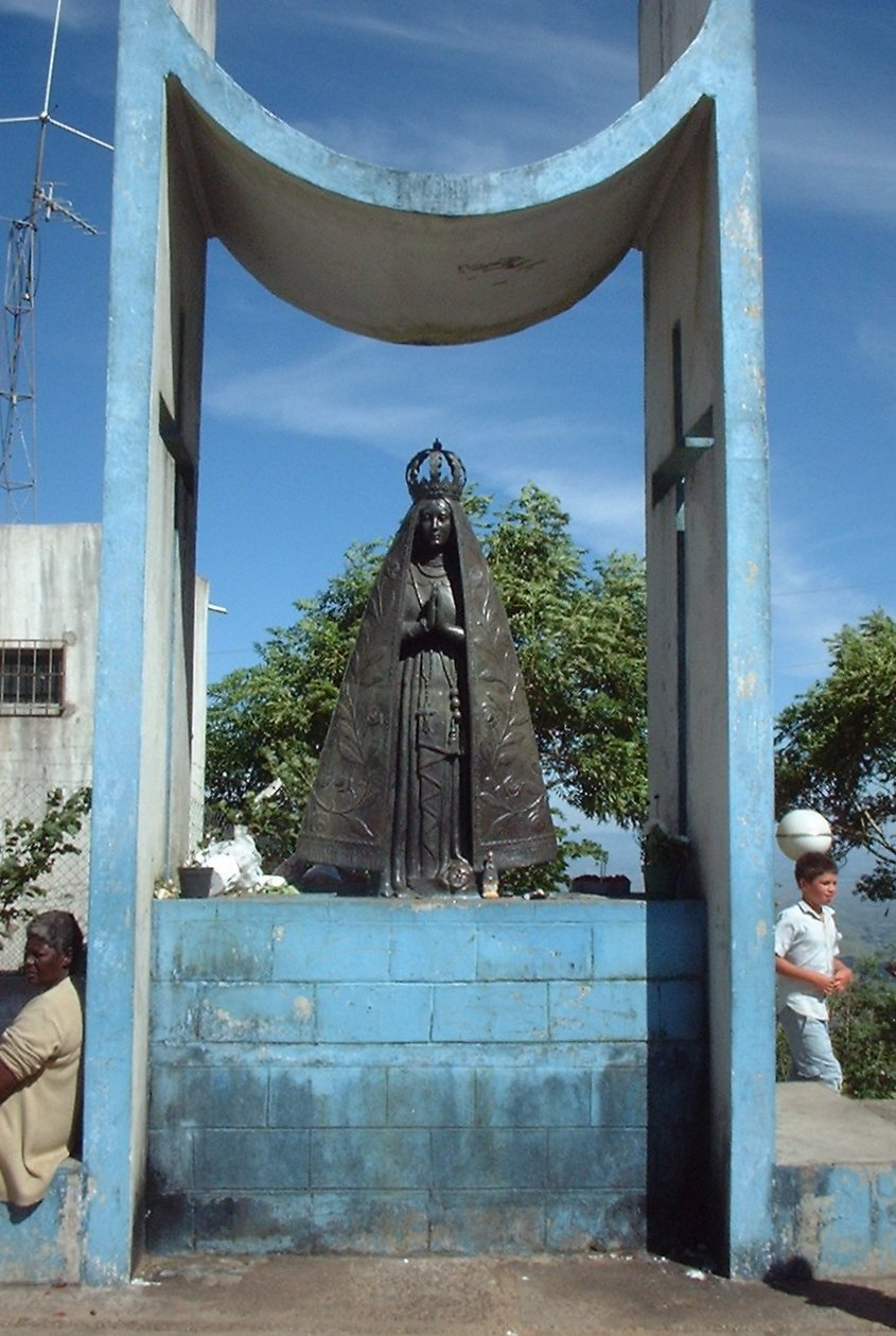 Imagem de Nossa Senhora, localizada na Garganta do Embaú, Serra da Mantiqueira